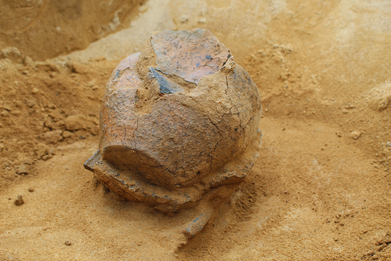 Ausgrabung der Grubenhaussiedlung Reese, Gefäß in situ